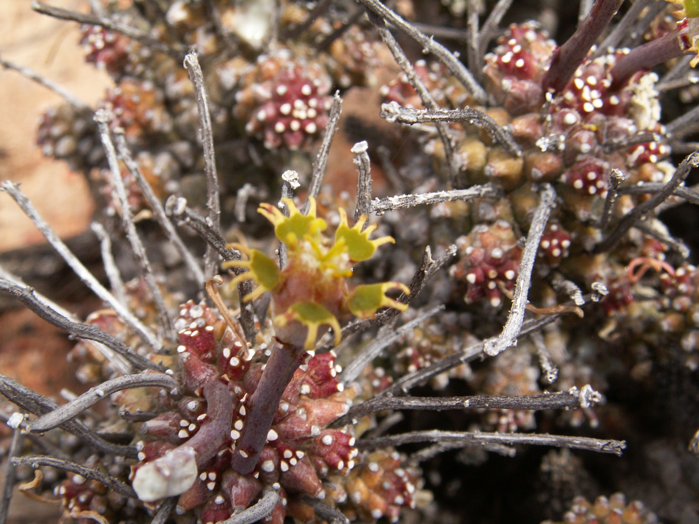 Euphorbia rudis ., Steinkopf/Richtersveld 2005, Südafrika